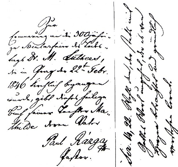 Widmungstext an seine Tochter